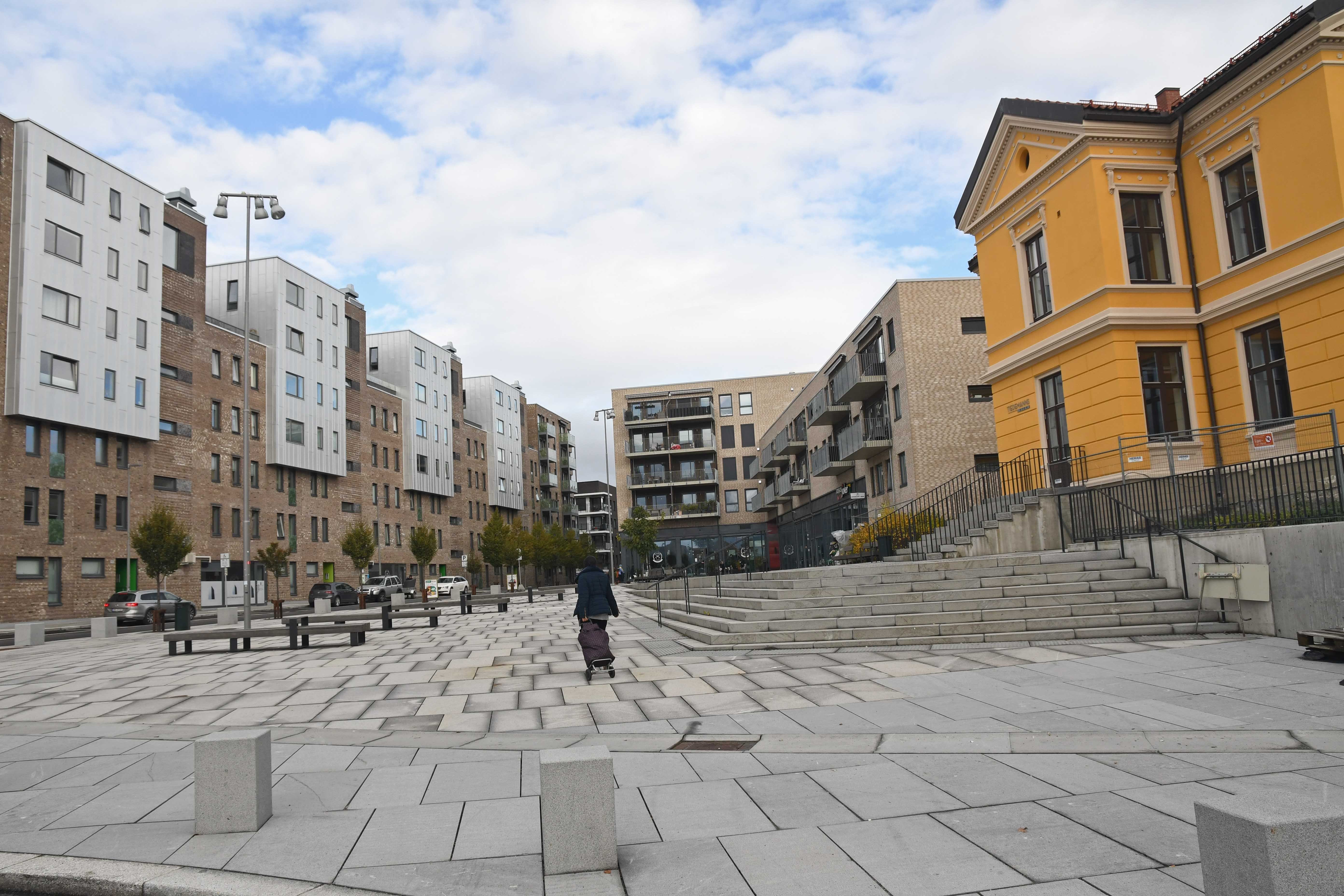 Petersborgplassen Ensjø. Petersborg, Ensjøveien 12C, er det gule huset. Sigurd Hoels vei går til venstre for plassen.